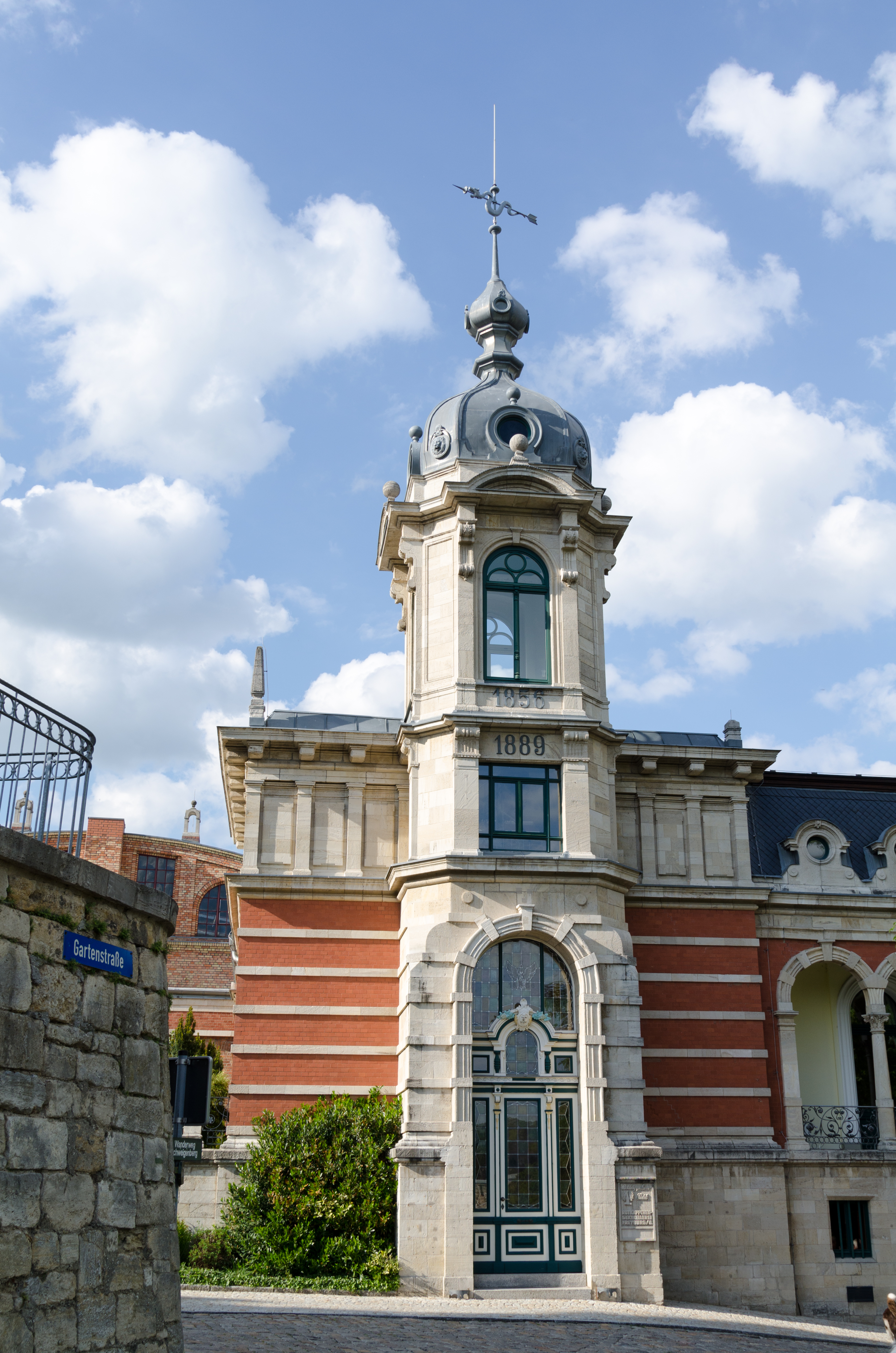 Freyburg an der Unstrut, Sektkellereistraße 5